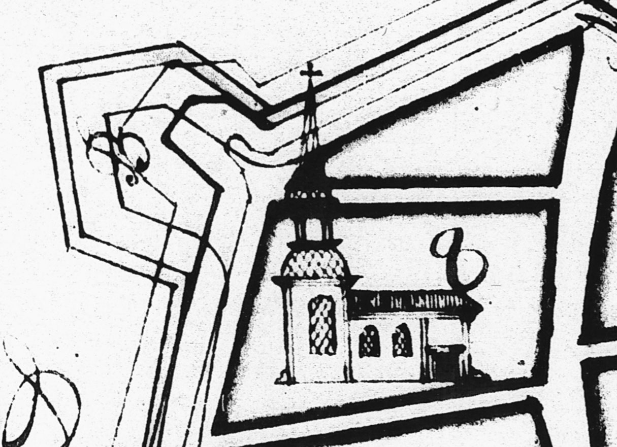 Анастасіївська гетьманська церква побудована 1717 року на карті Глухова 1724 року